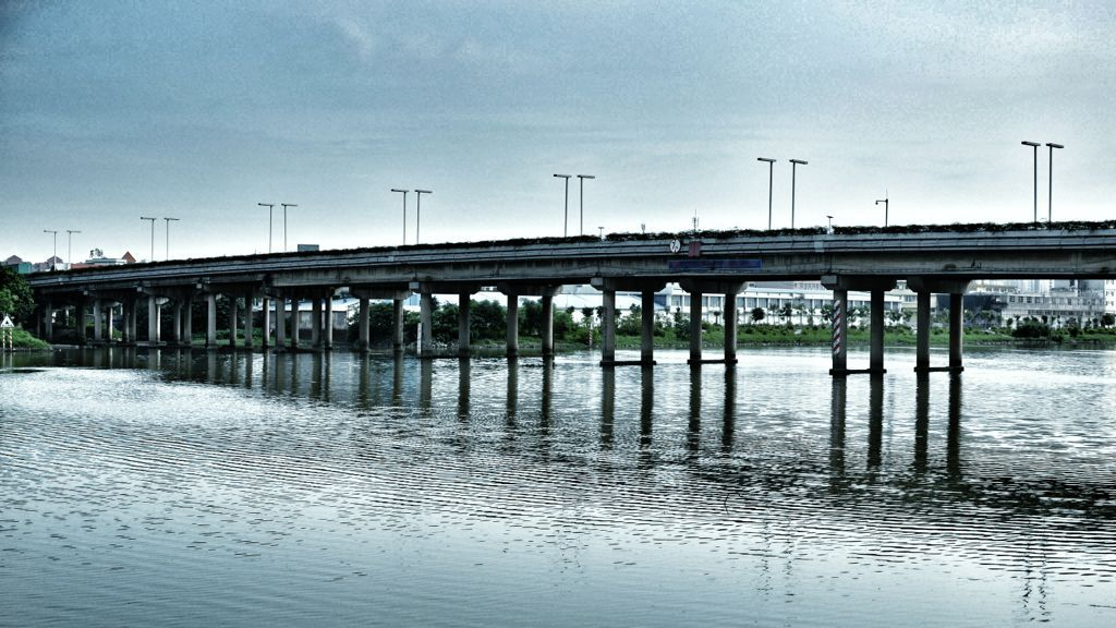 市桥二桥2012